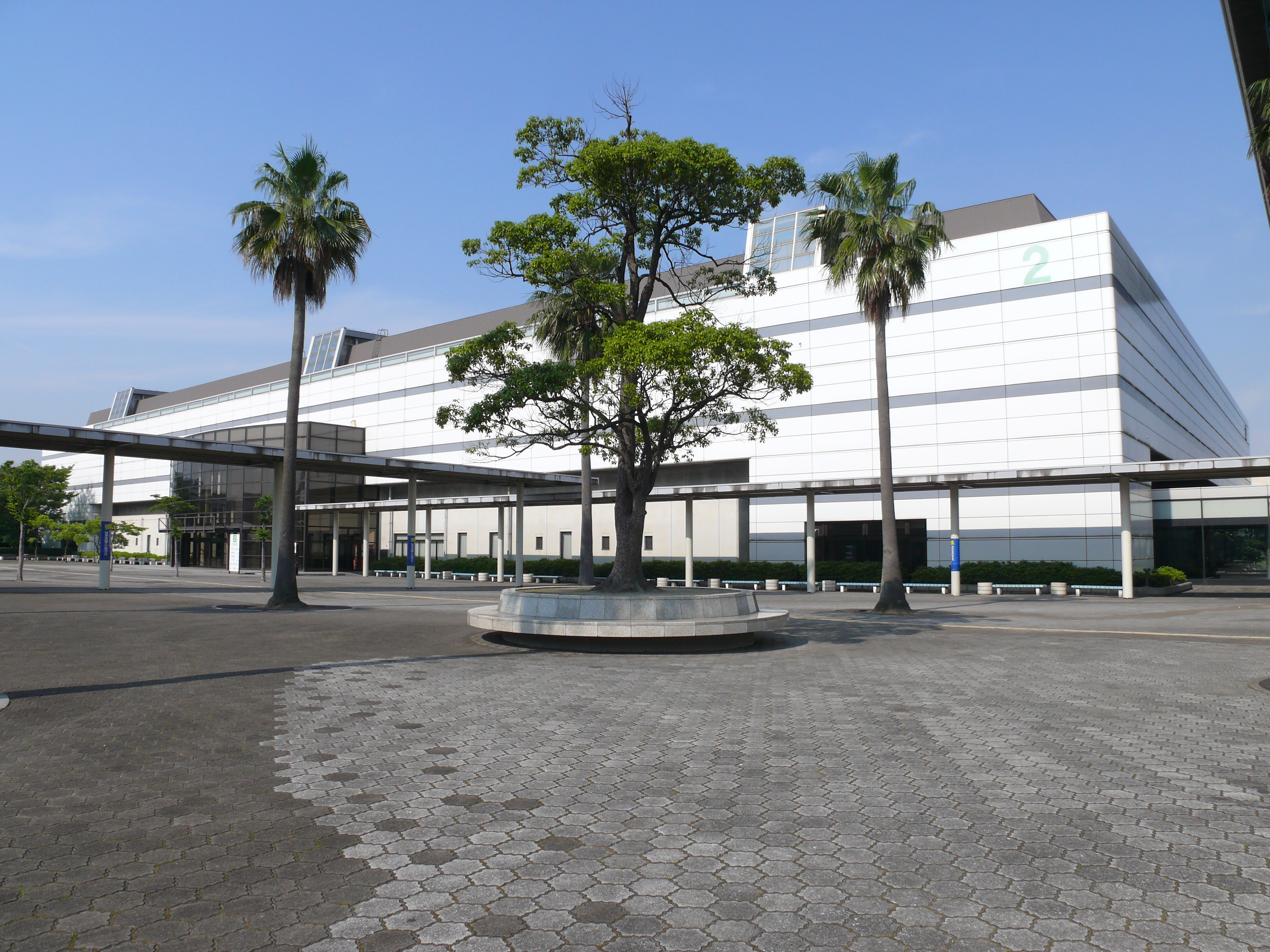 愛知県名古屋市港区にある名古屋市国際展示場（ポートメッセなごや）の第2展示館。